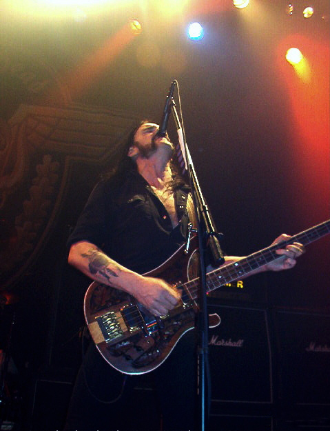 Lemmy Kilmister, , Columbie, MO